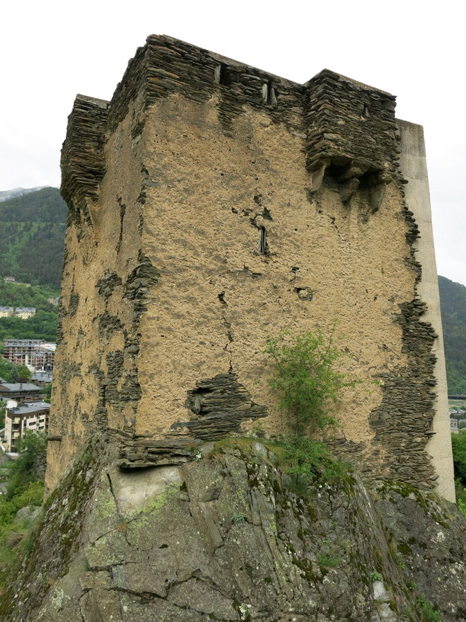 Castell de Les Bons, Encamp, Andorra